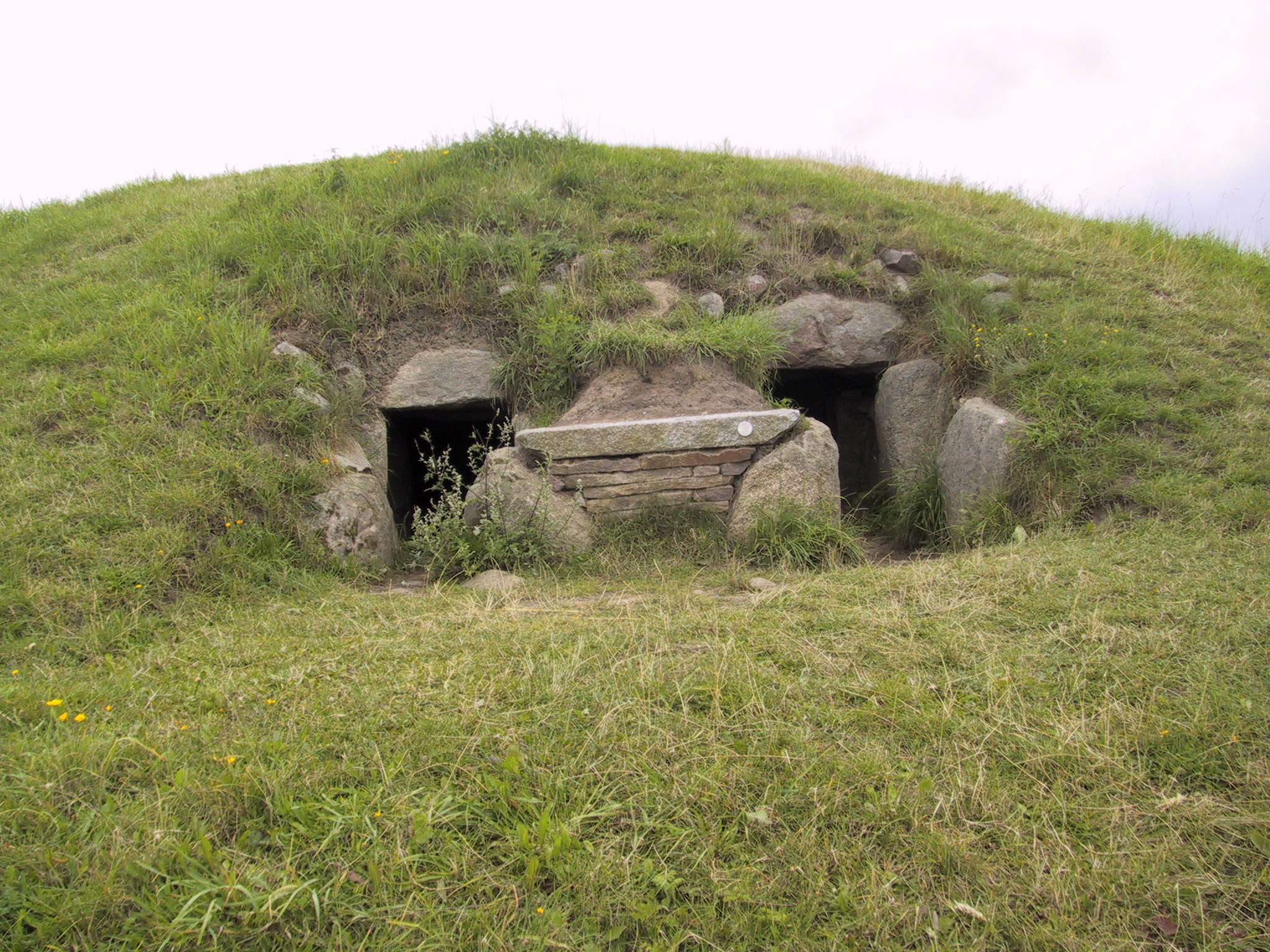 Der Klekkende_Høj, ein Doppelganggrab zwischen Tostenæs und Røddinge auf der Insel Møn.